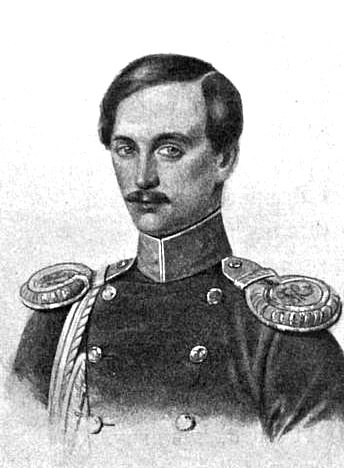 Флигель-адъютант Виктор Иларионович Васильчиков